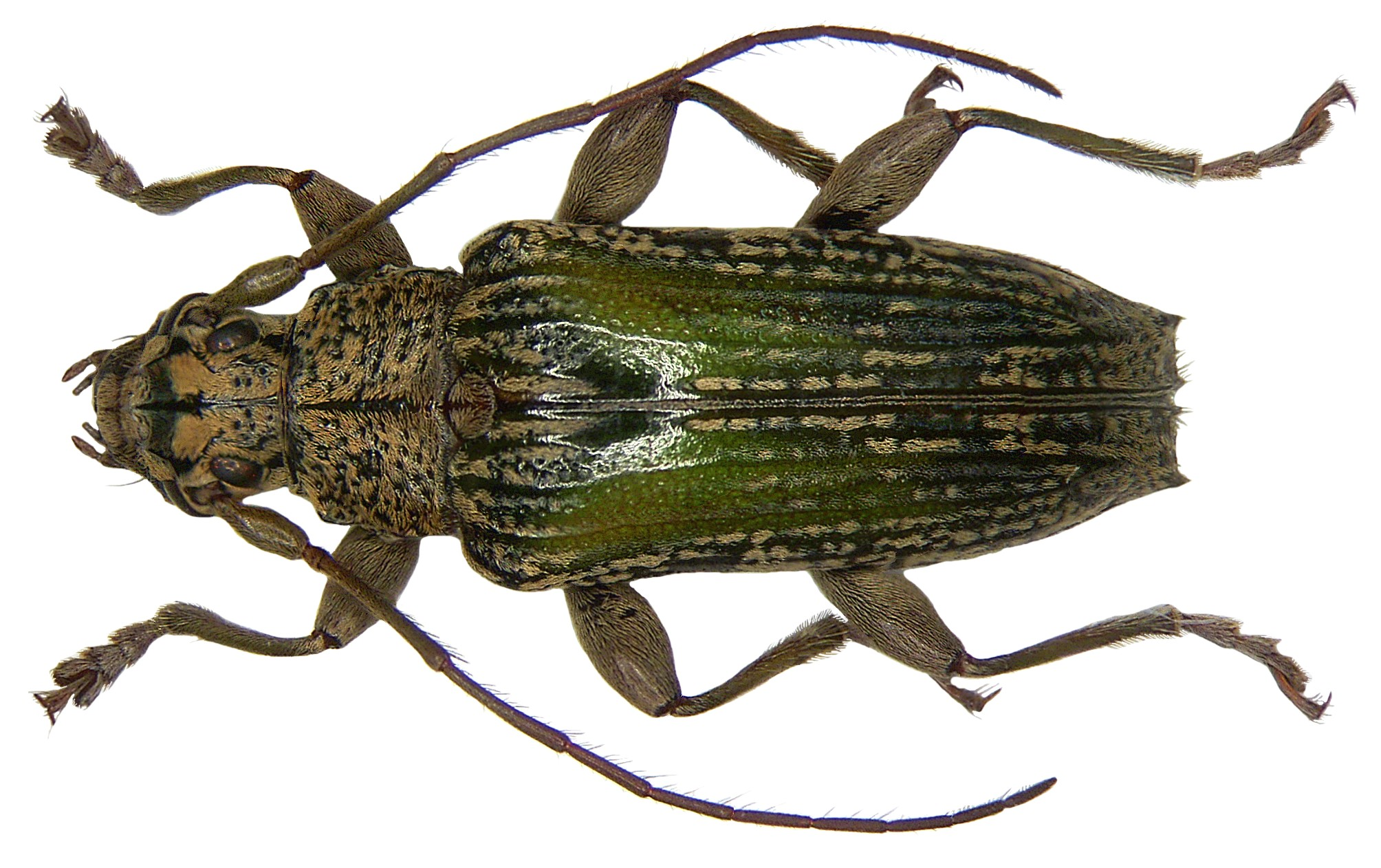 Familie: Cerambycidae Grösse: 12 mm Fundort: Indonesien, West-Papua, Mokwam leg. A.Skale, 2007; det. A.Weigel Foto: U.Schmidt, 2007